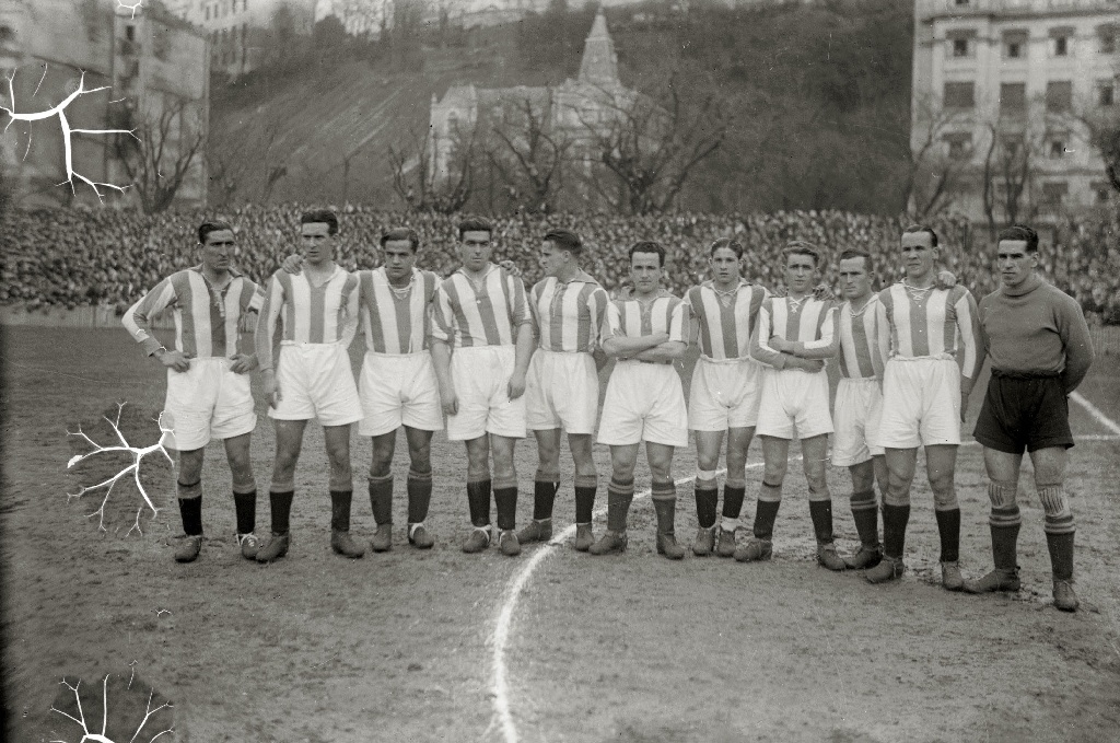 Título original: Alineacion de la Real Sociedad en el campo de Atotxa (1/1) Localización: San Sebastián (Guipúzcoa)